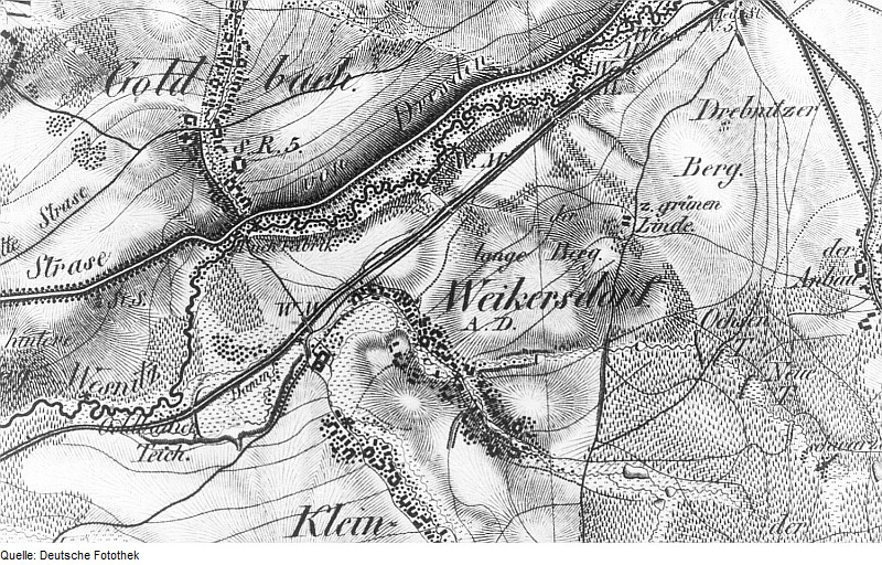 Original image description from the Deutsche Fotothek Bischofswerda-Weickersdorf. Oberreit, Sect. Stolpen, 1821/22